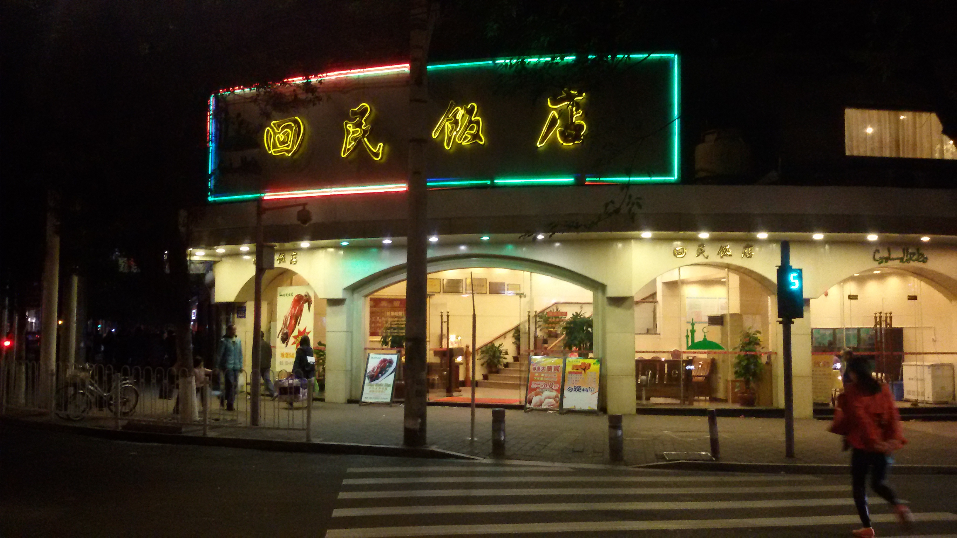 粵語: 回民酒家